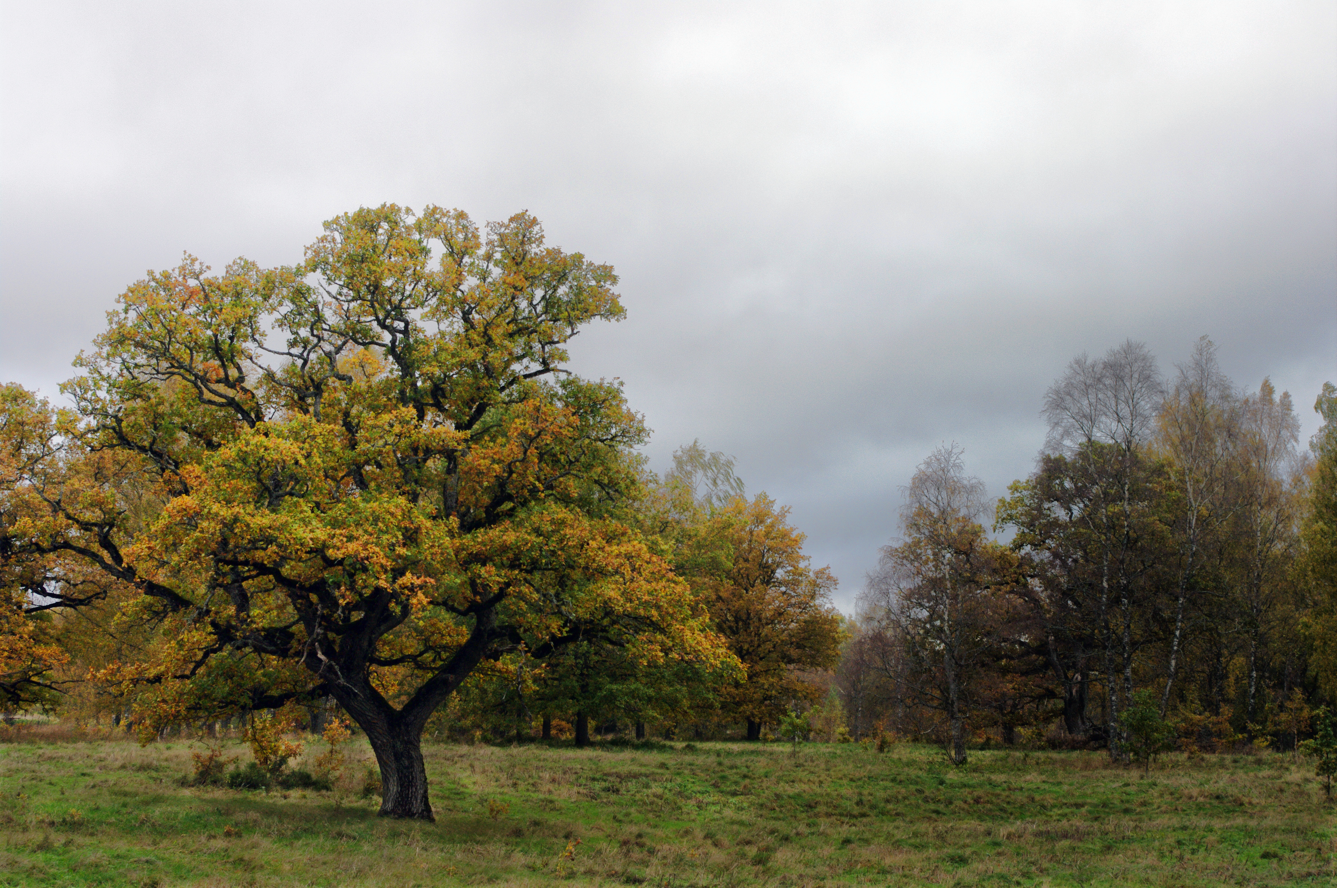 Mädapea tammik, Mädapea tammiku MKA